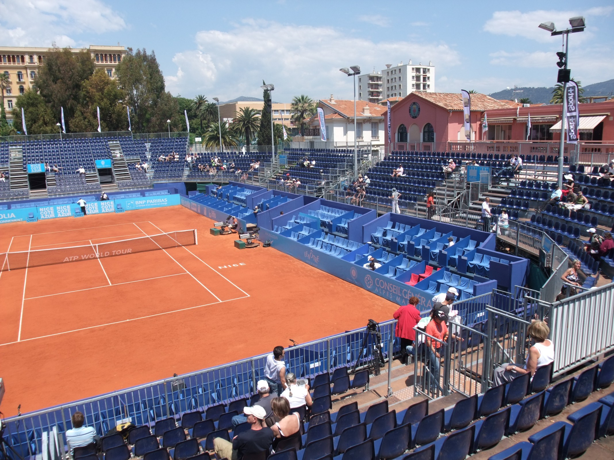 Tournoi ATP de Nice 2010 - Court Central